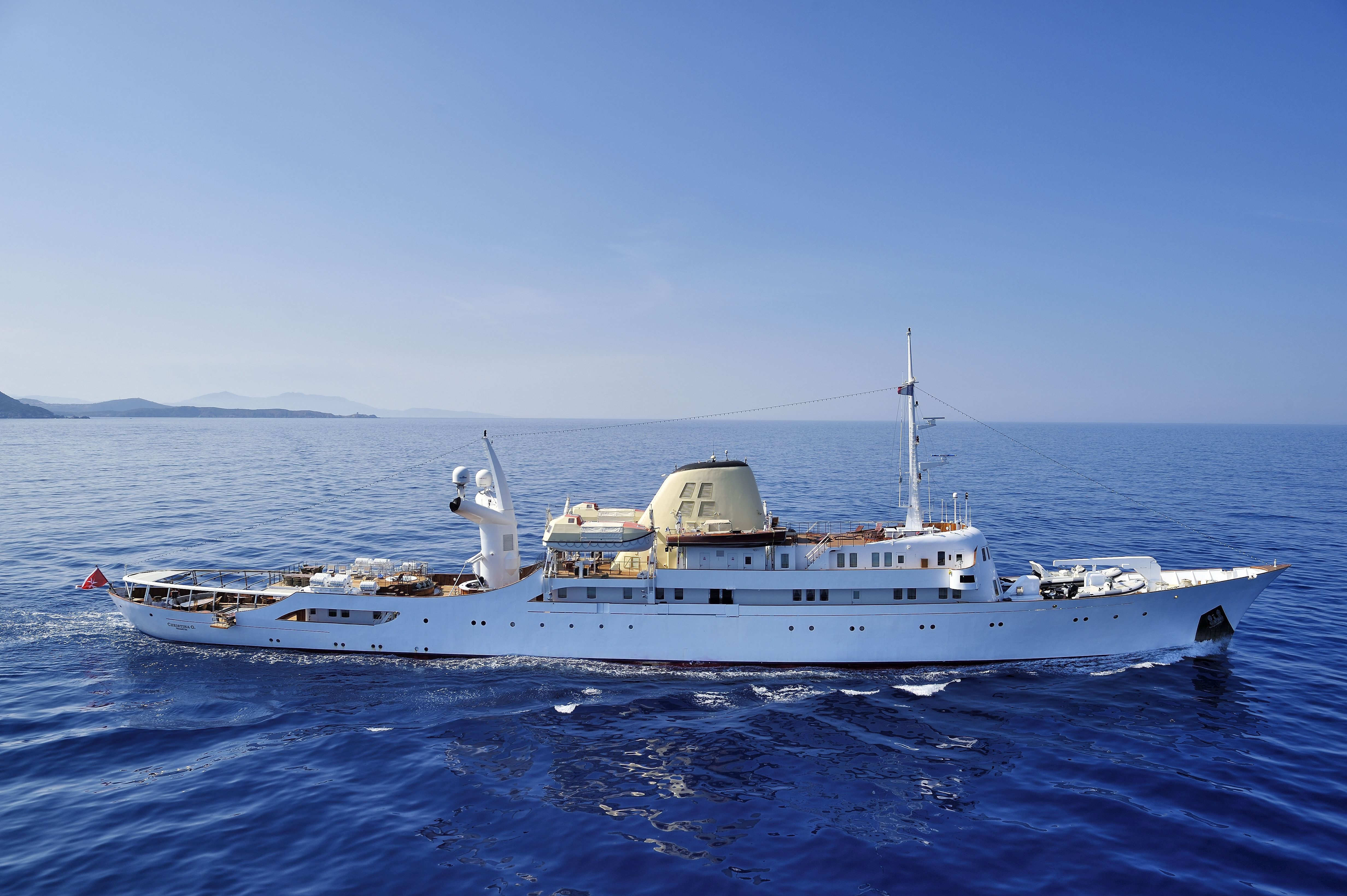 Le yacht CHRISTINA O aujourd'hui disponible à la location